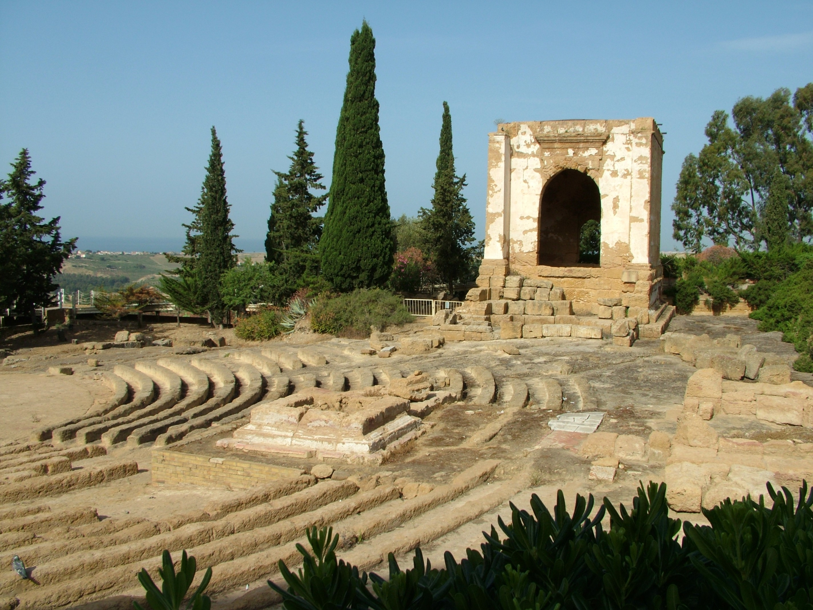 Agrigento, das Ekklesiaterion am Museum